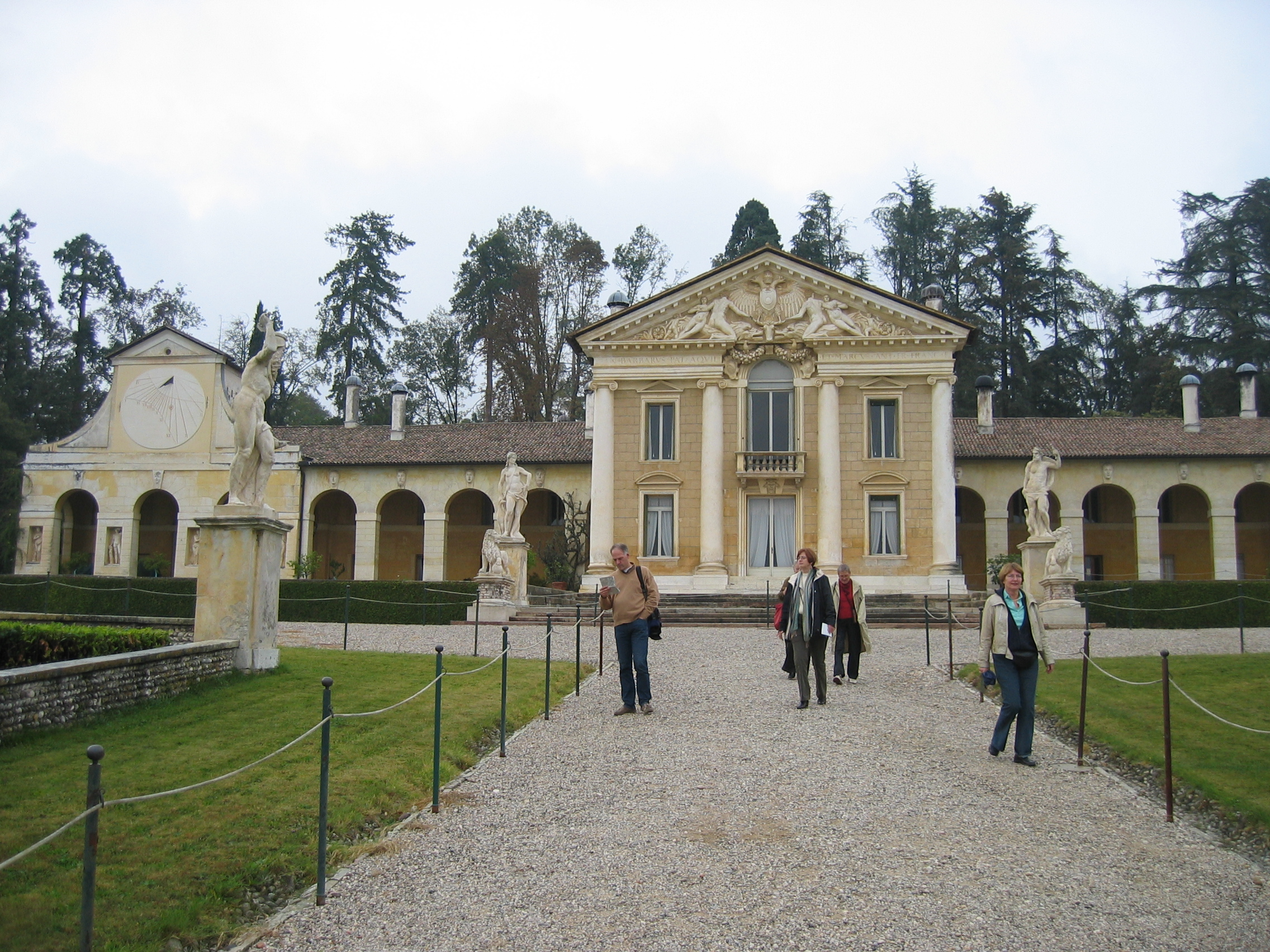 Villa Barbaro, Maser (Veneto, Italie).Eigen foto 2006